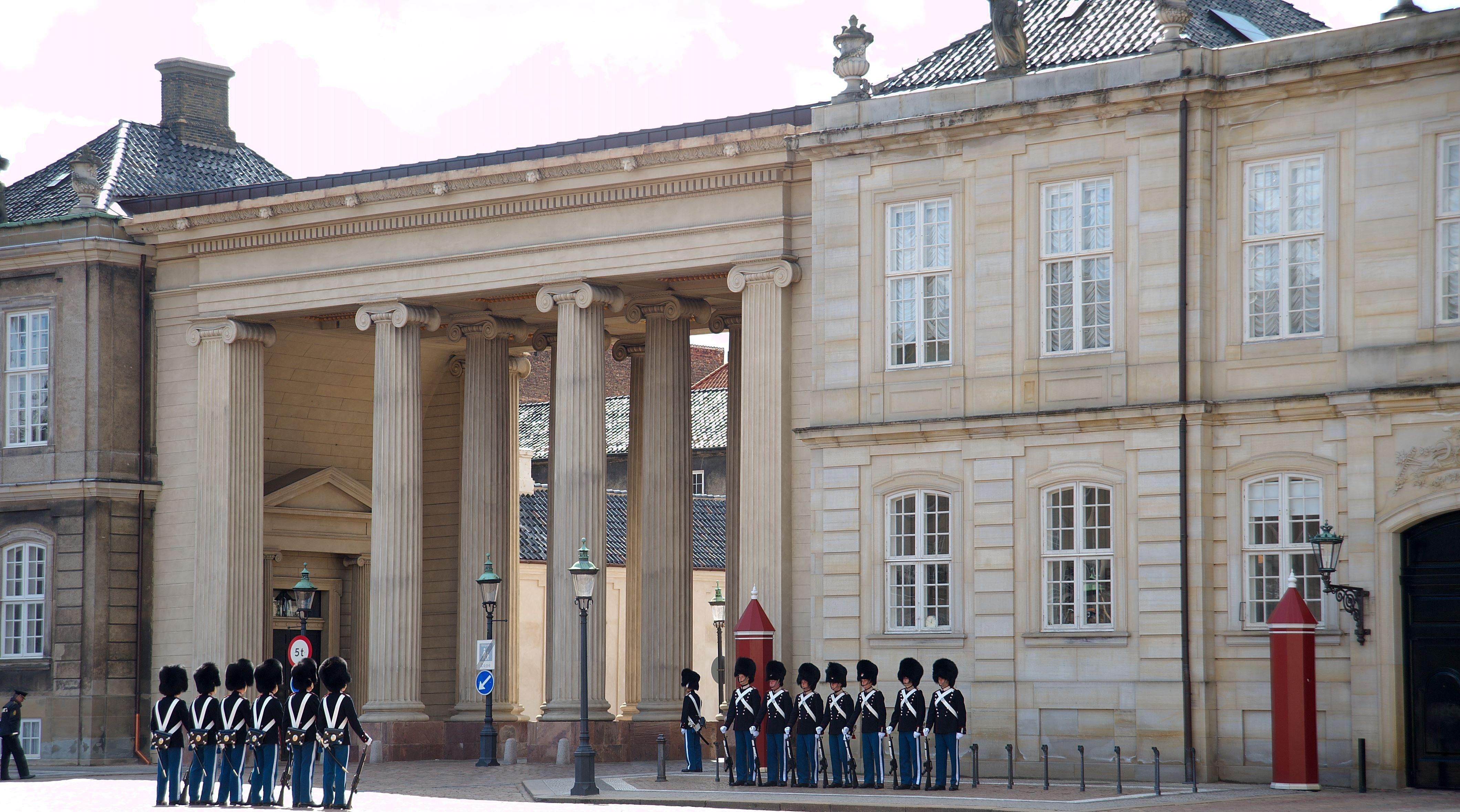 Amalienborg med C.F. Harsdorffs kolonnade